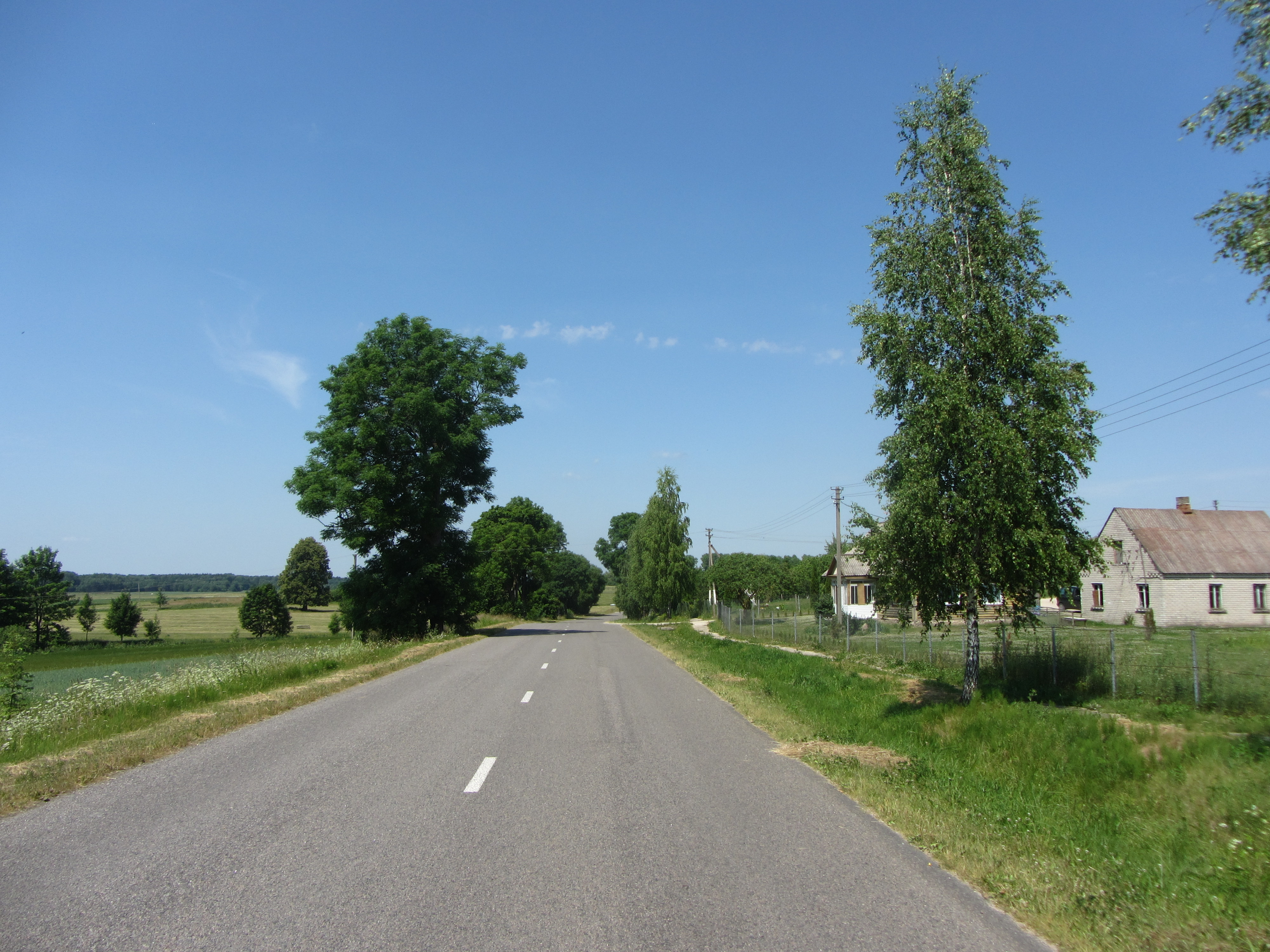 Mišniūnai 20229, Lithuania